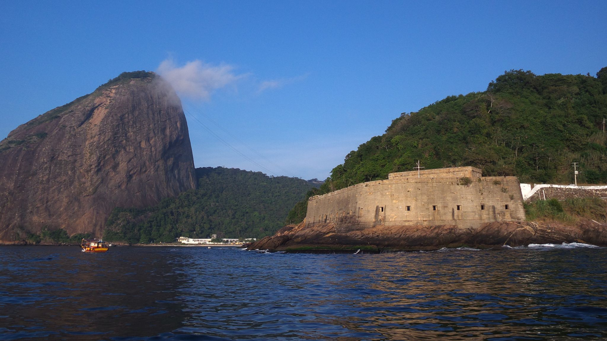 Fortaleza de São José: portão